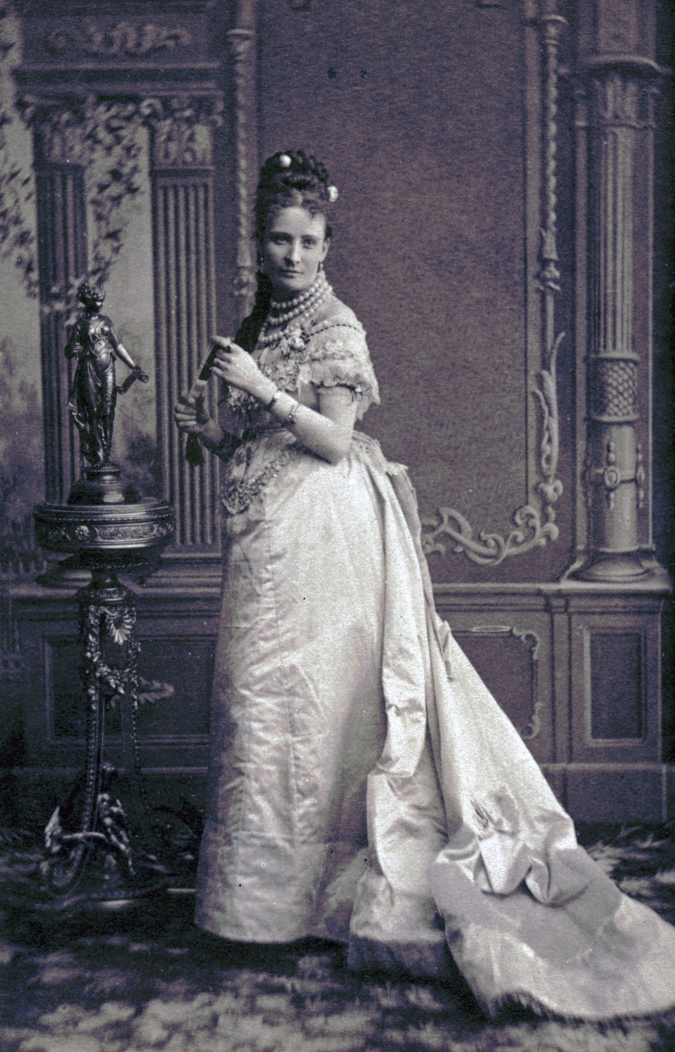 Clara Gardt, porträtt 1874